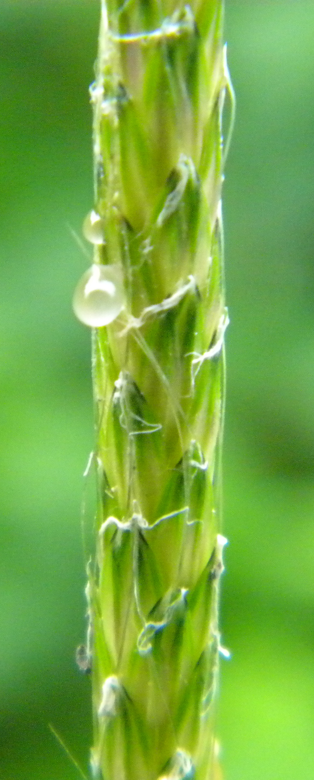 Miellat du à Claviceps purpurea sur Alopecurus myosuroides